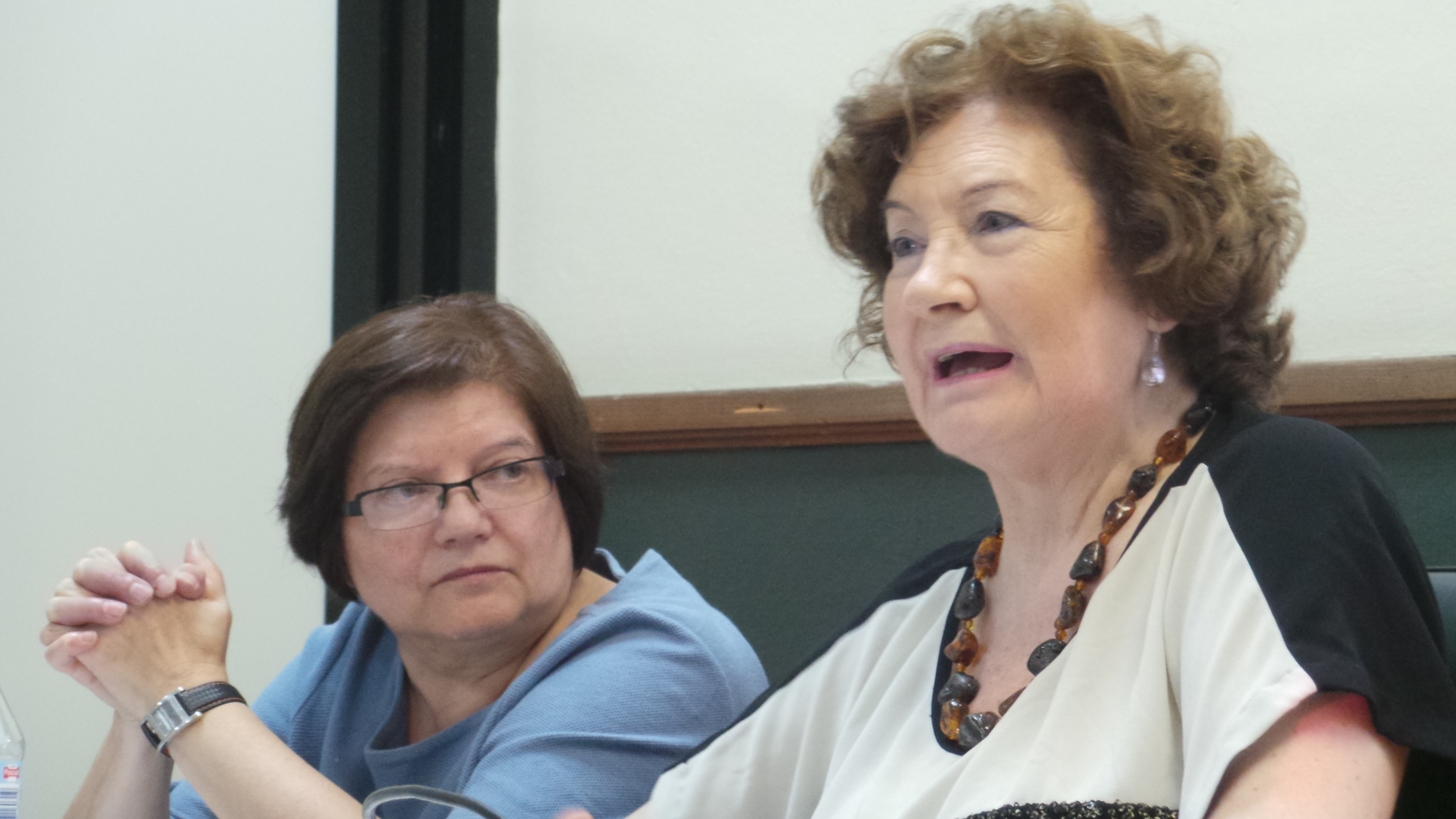 Universidad de Verano de Estudios de Género Palma de Mallorca Septiembre de 2015